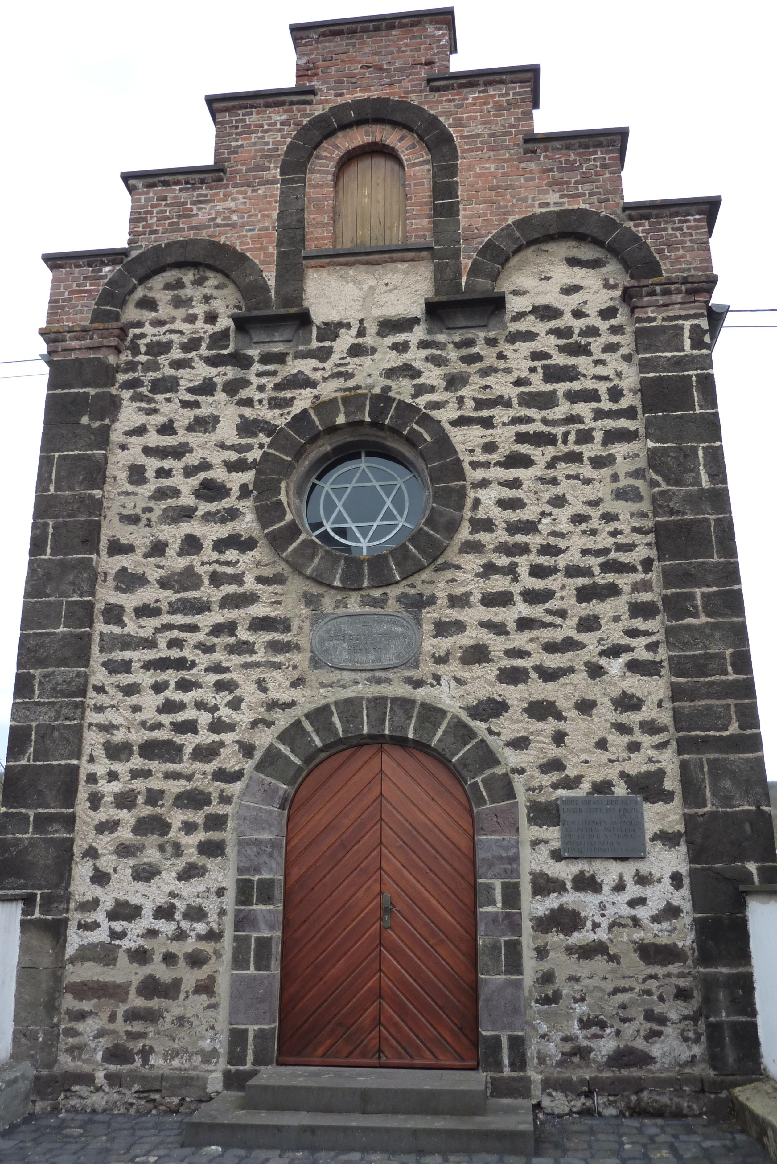 Synagoge Saffig, Hauptfassade